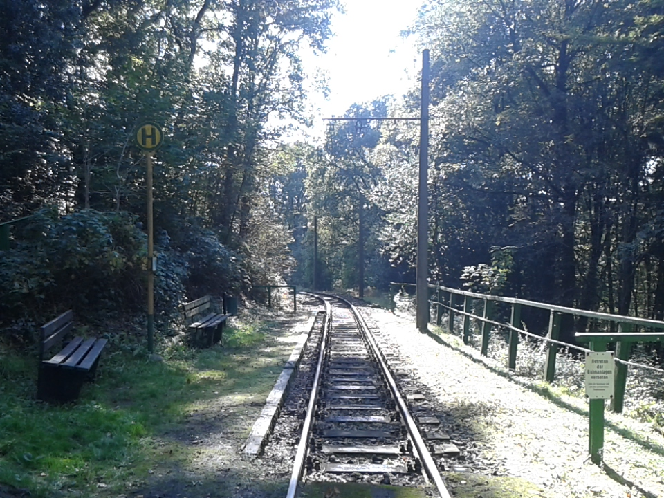 Die Haltestelle Petrikshammer der Bergischen Museumsbahnen